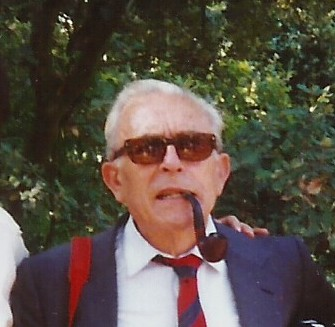 Jacques Faizant, le célèbre dessinateur du Figaro en 1991